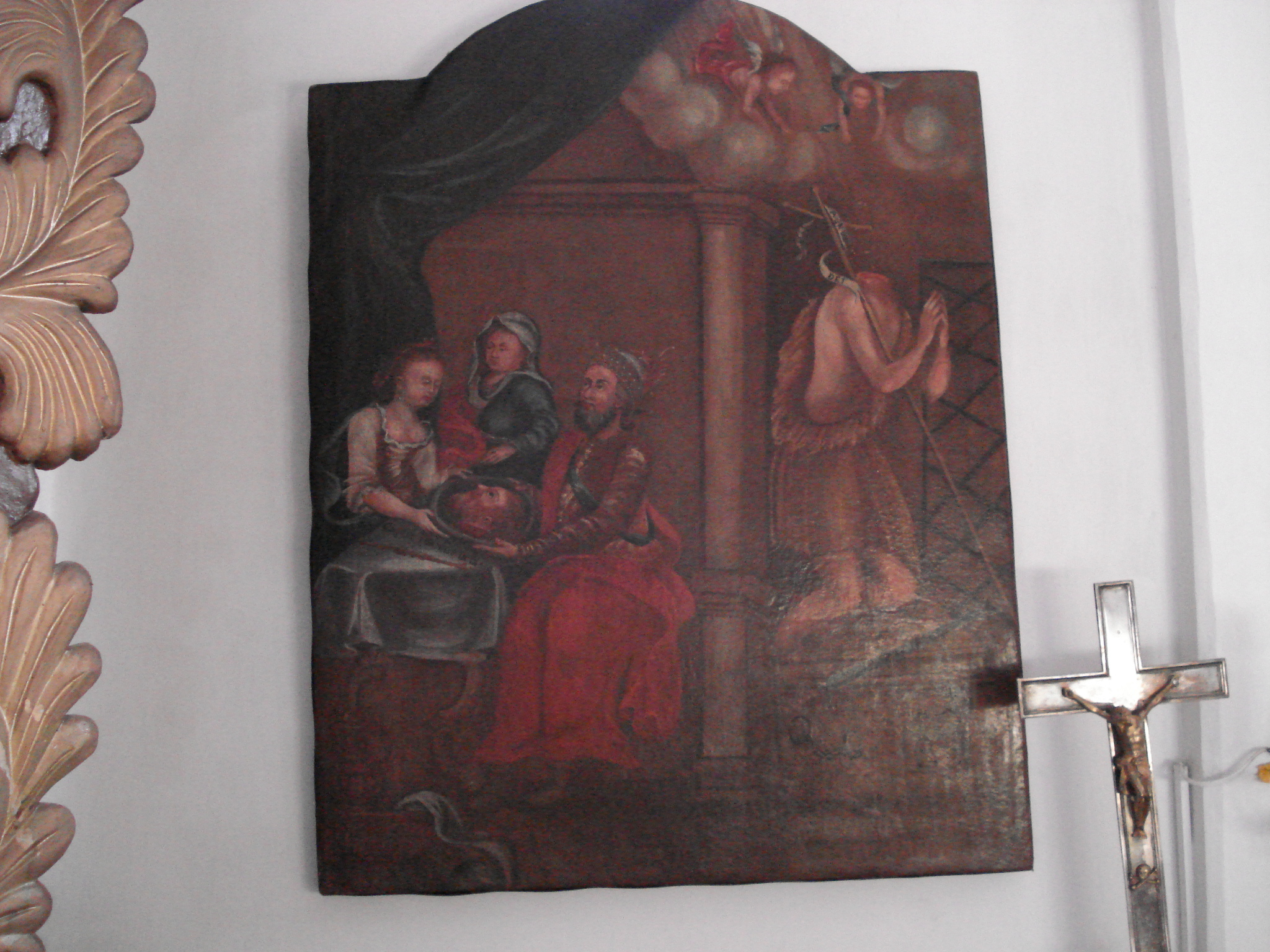 Kościół parafialny w Budzynku (pow. Poddębice). Obraz przedstawiający ścięcie św. Jana nawiązuje do wezwania kościoła